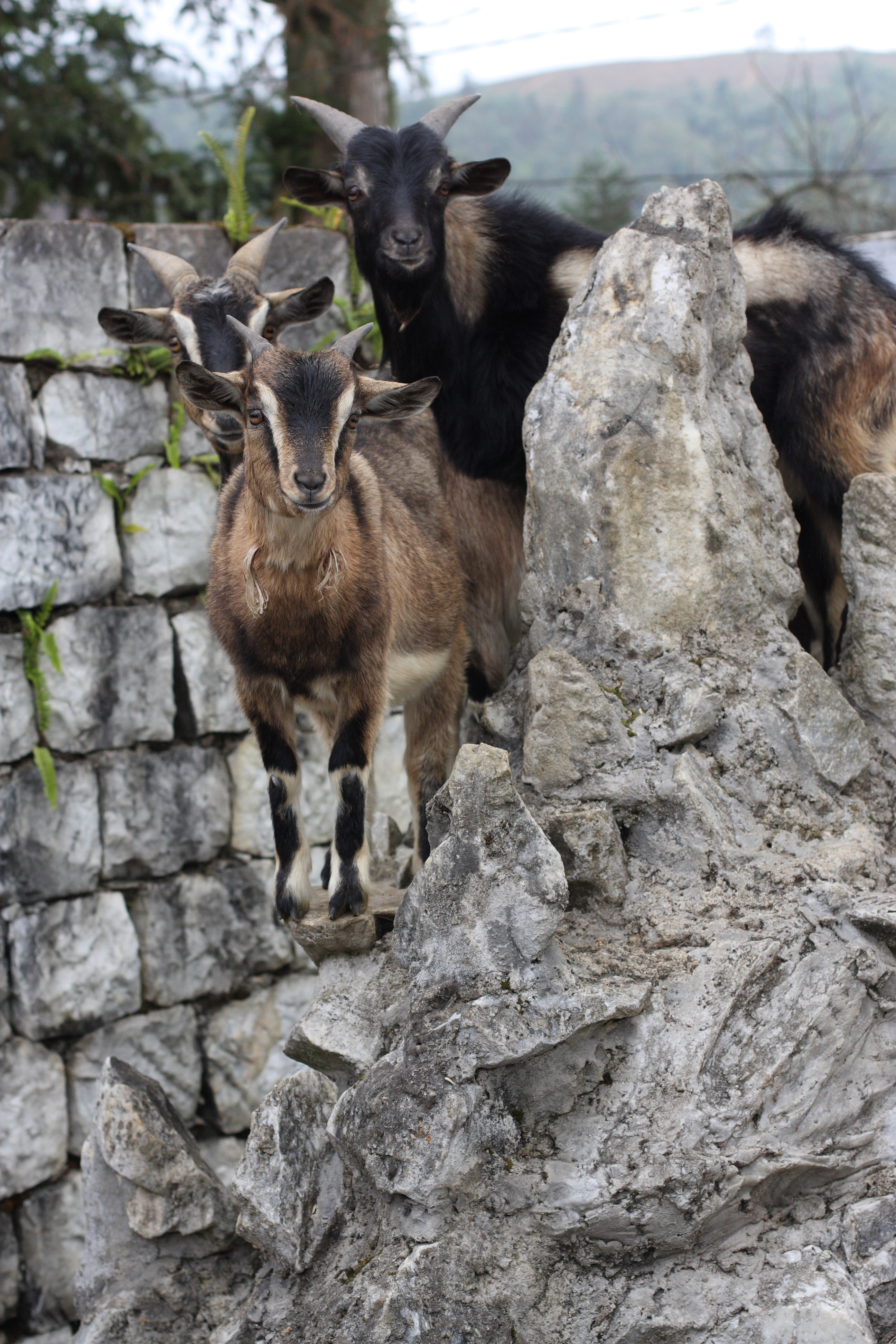 Sapa, Vietnam